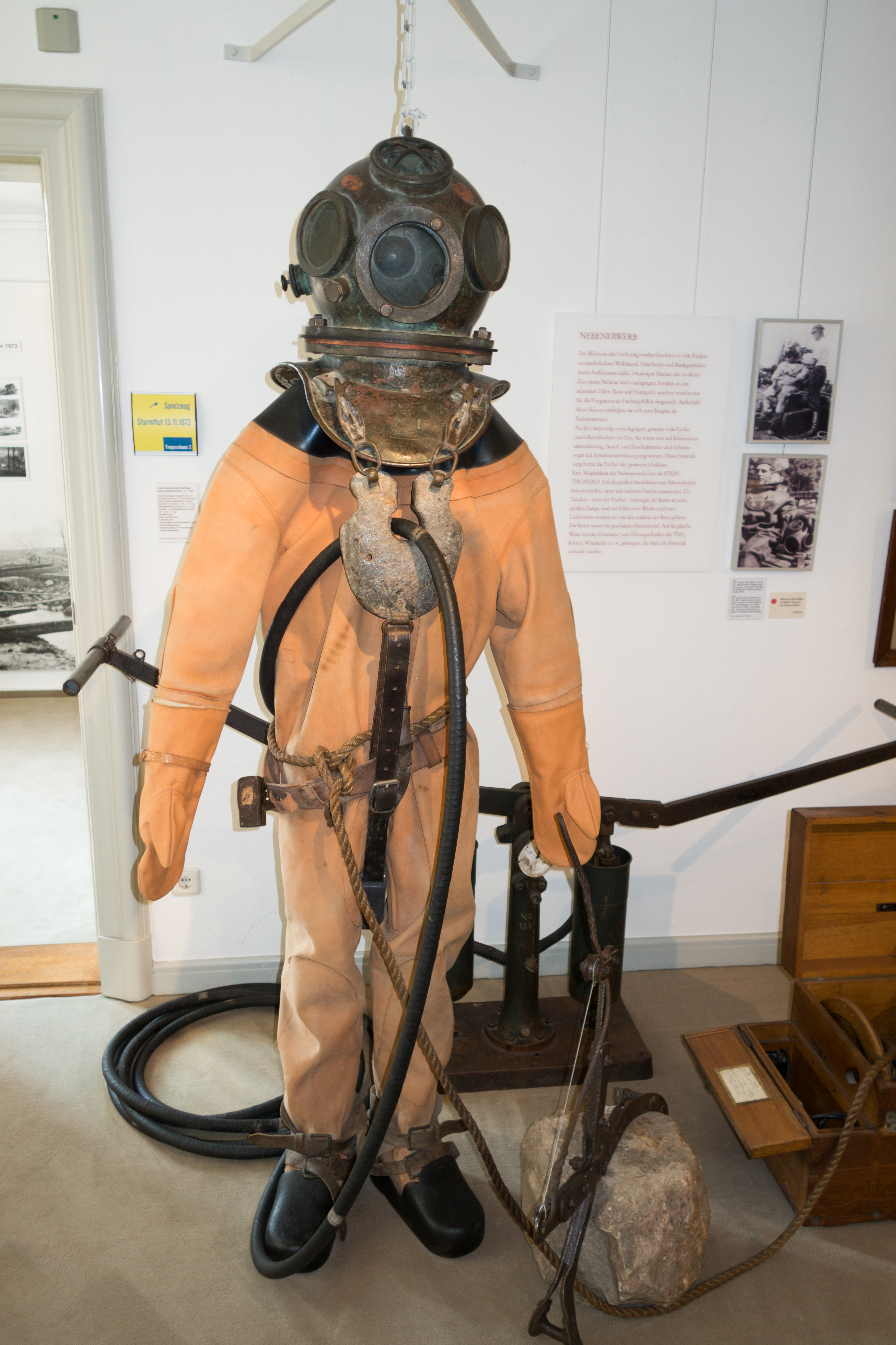 Eckernfoerde, Germany, 2014